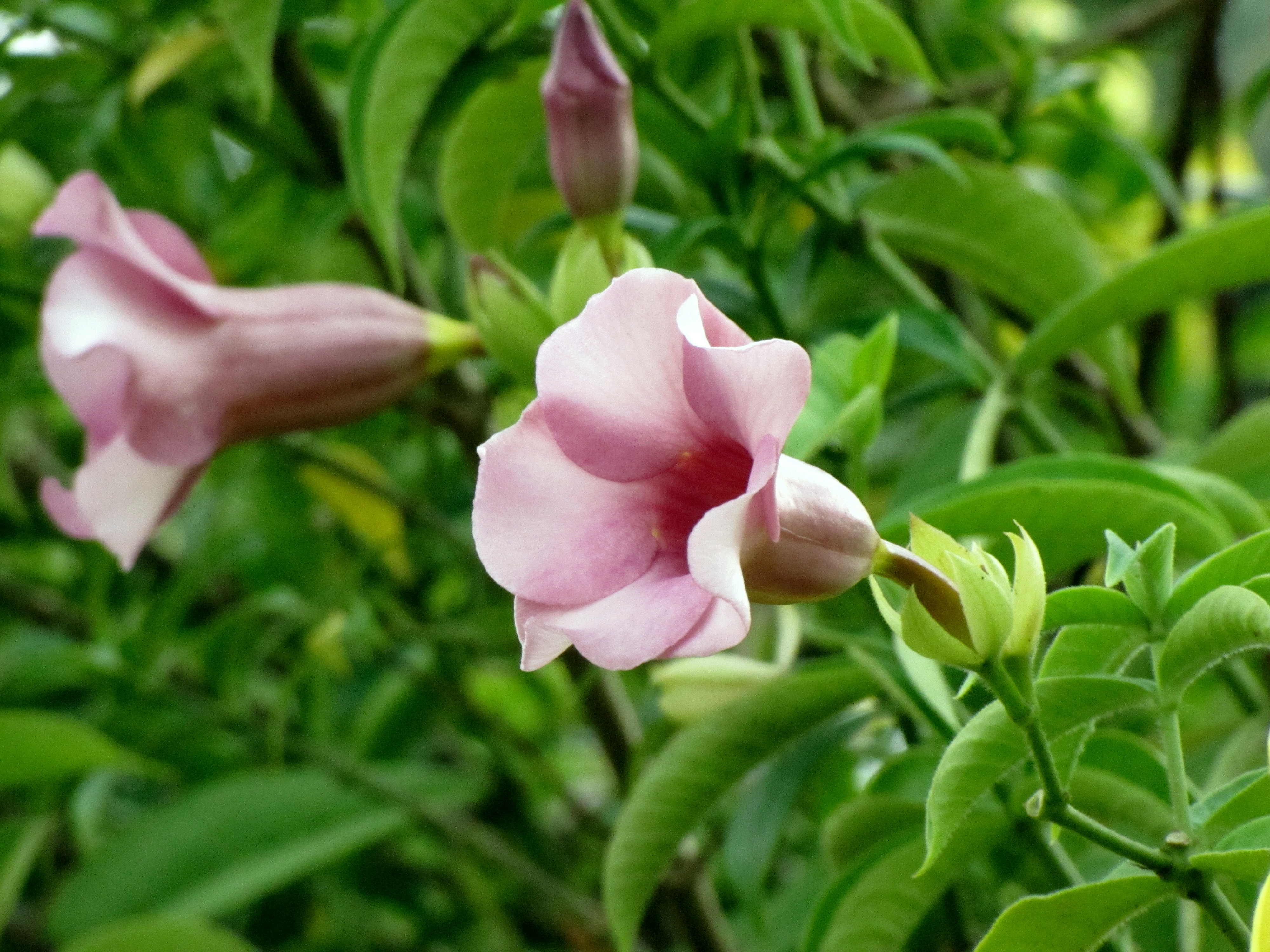 Allamanda blanchetii from Kanhangad, Kasargod